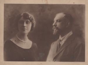 Анна Александровна и Степан Павлович Рябушинские в Милане в год серебряной свадьбы (1922).